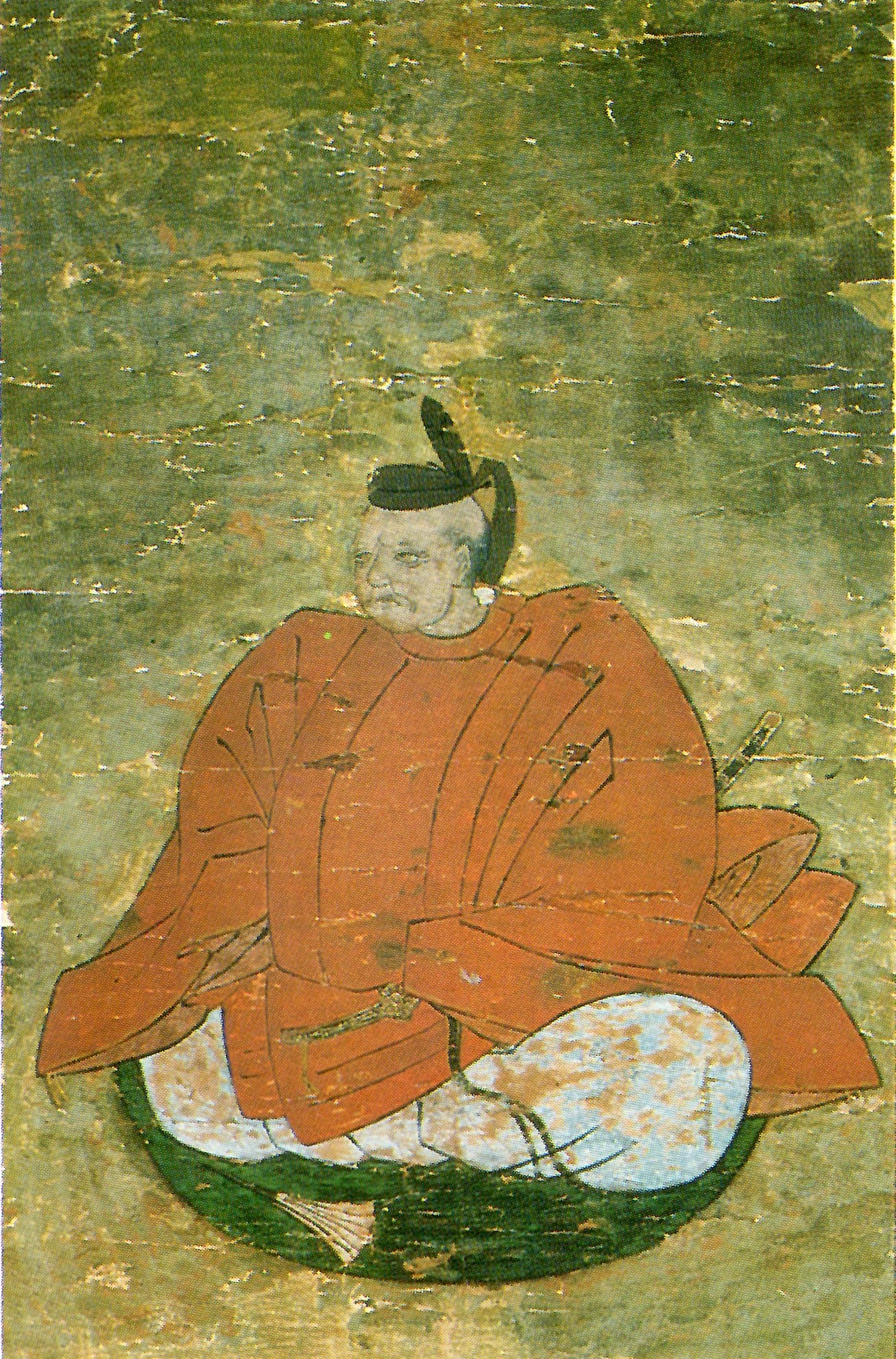 水谷勝俊の肖像。